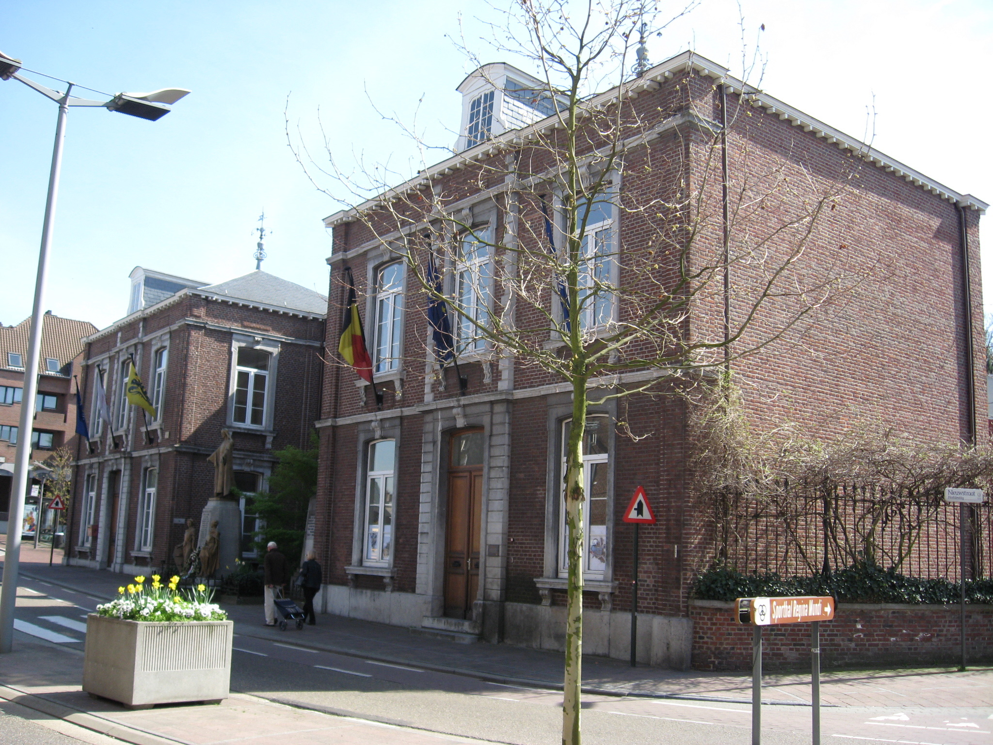 Voormalig gemeentehuis in neoclassicistische stijl in Genk